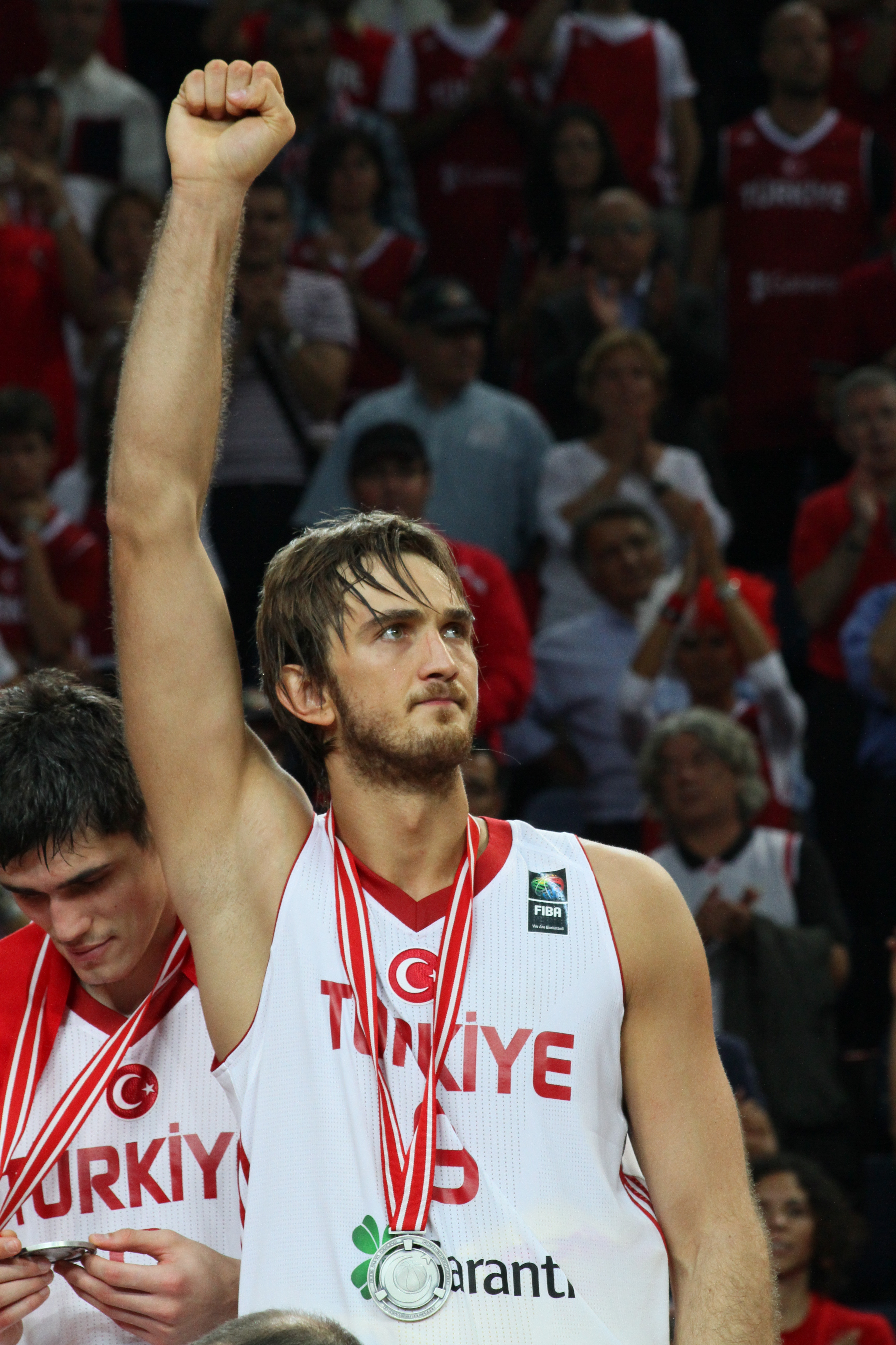 Semith Erden celebra con un brazo en alto la obtención de medalla de plata en el Mundial de baloncesto 2010.